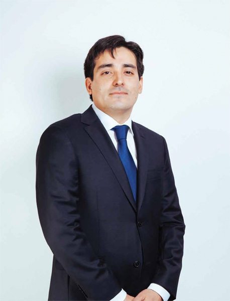 Rodrigo Peñailillo Briceño, Ministro del Interior (2014).